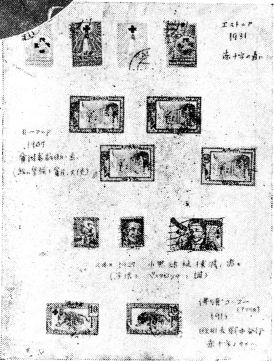 土井英一が集めて、内ヶ崎作三郎に資料として託した外国の慈善切手の一部